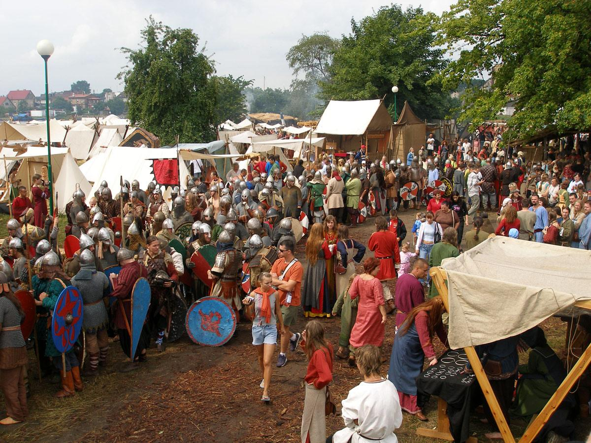 Wioska Wikingów